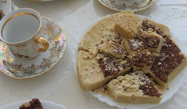 Дема ховла (чеч. Дема хьовла) —- традиционное национальное сладкое блюдо чеченцев и является обрядовым блюдом